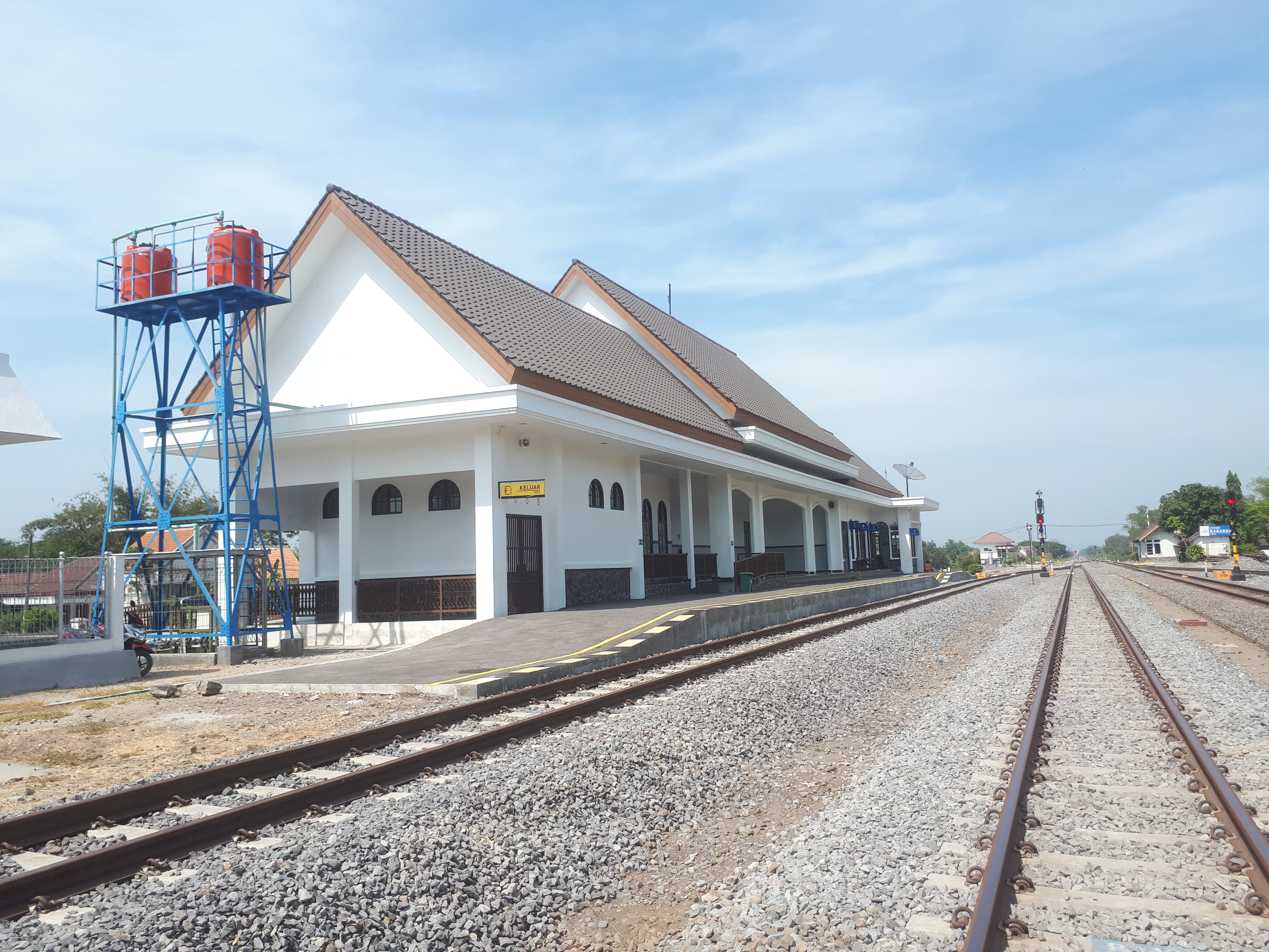 Stasiun Babadan Baru mulai beroperasi pada 30 April 2019 bersamaan dengan aktivasi rel jalur ganda Stasiun Babadan dan Stasiun Nganjuk.